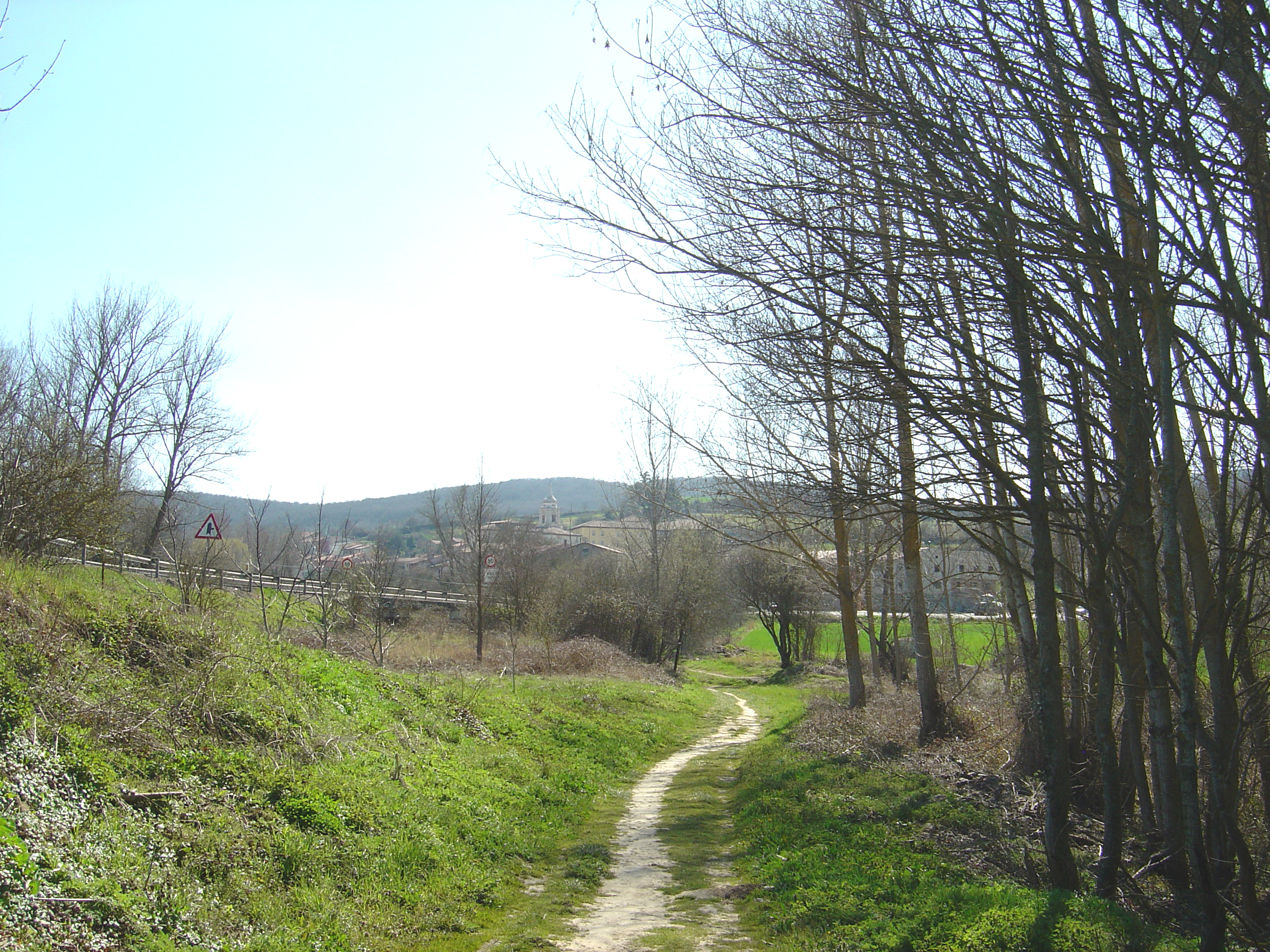 Villafranca Montes de Oca. Burgos. Álava.